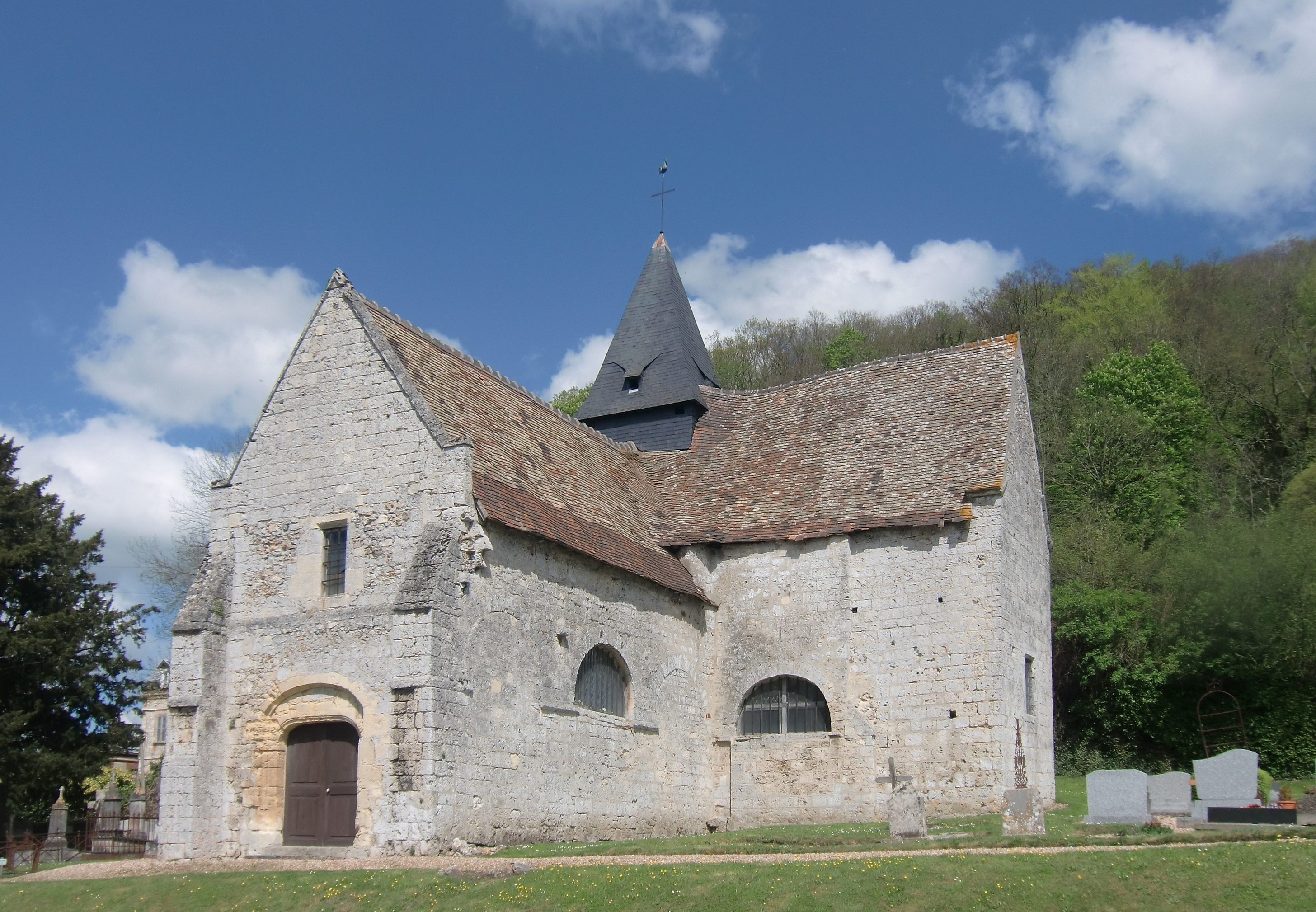 Eglise de Fiquefleur (Eure - Normandie - France)